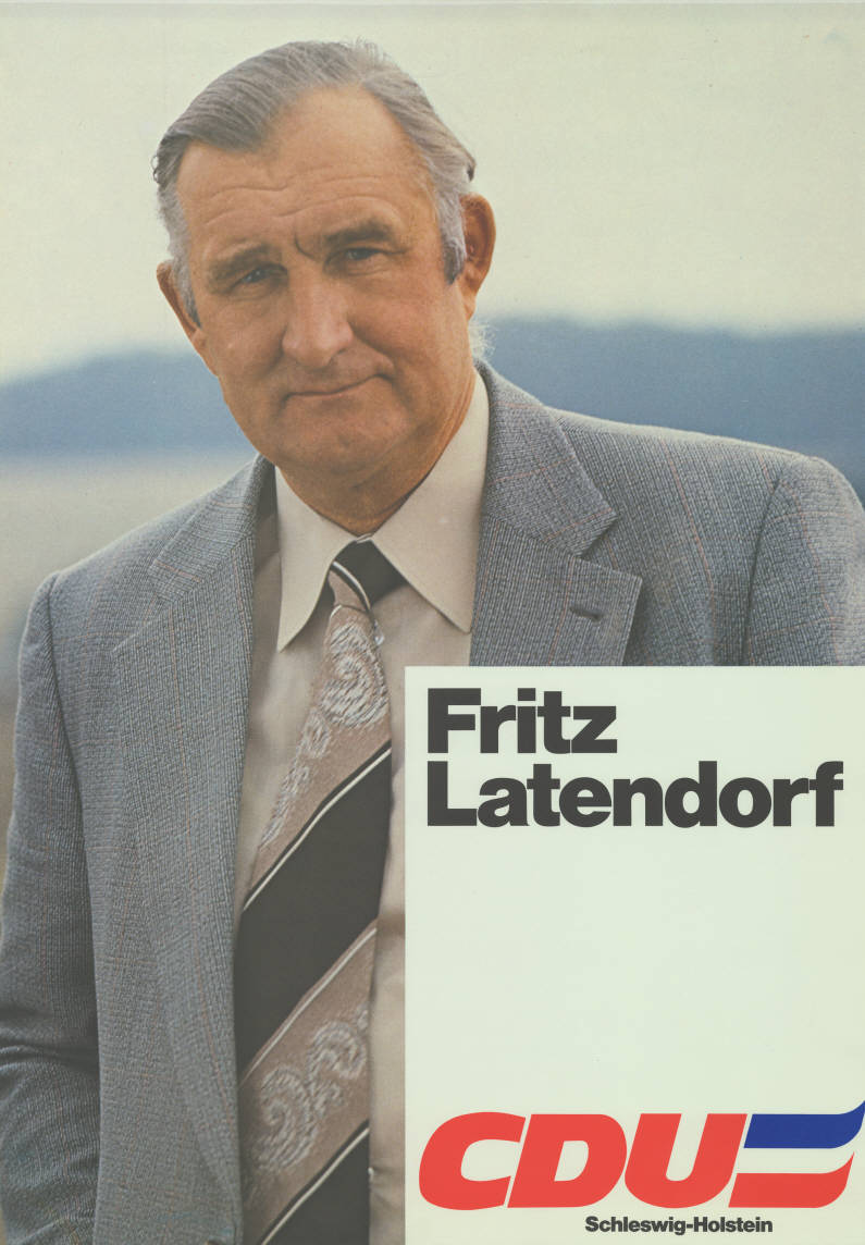 Fritz Latendorf CDU Schleswig-Holstein Abbildung: Foto Plakatart: Kandidaten-/Personenplakat mit Porträt Auftraggeber: Verantw.: CDU Schleswig-Holstein Objekt-Signatur: 10-012 : 432 Bestand: Landtagswahlplakate Schleswig-Holstein (10-012) GliederungBestand10-18: Landtagswahlplakate Schleswig-Holstein (10-012) » Landtagswahl am 29.4.1979 » Ankündigungsplakate Lizenz: KAS/ACDP 10-012 : 432 CC-BY-SA 3.0 DE